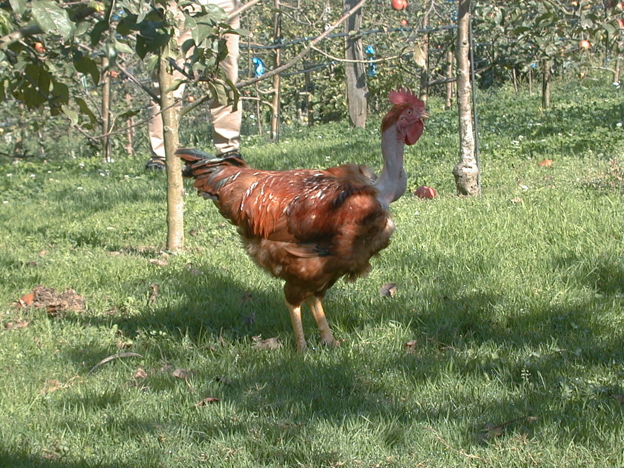 Euskal oiloa, barietate lepasoila